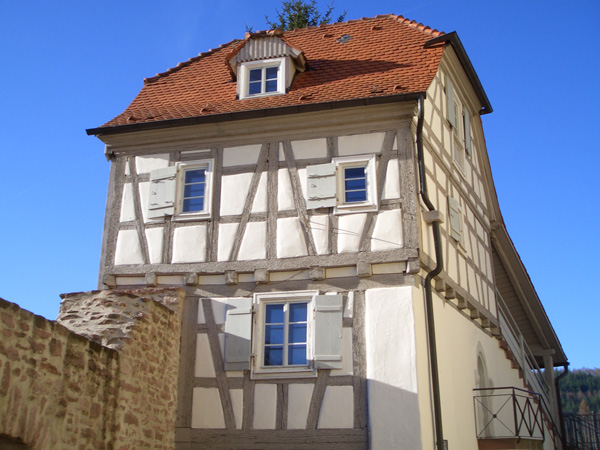 Torwärterhäuschen an der Vorderen Schlosssteige